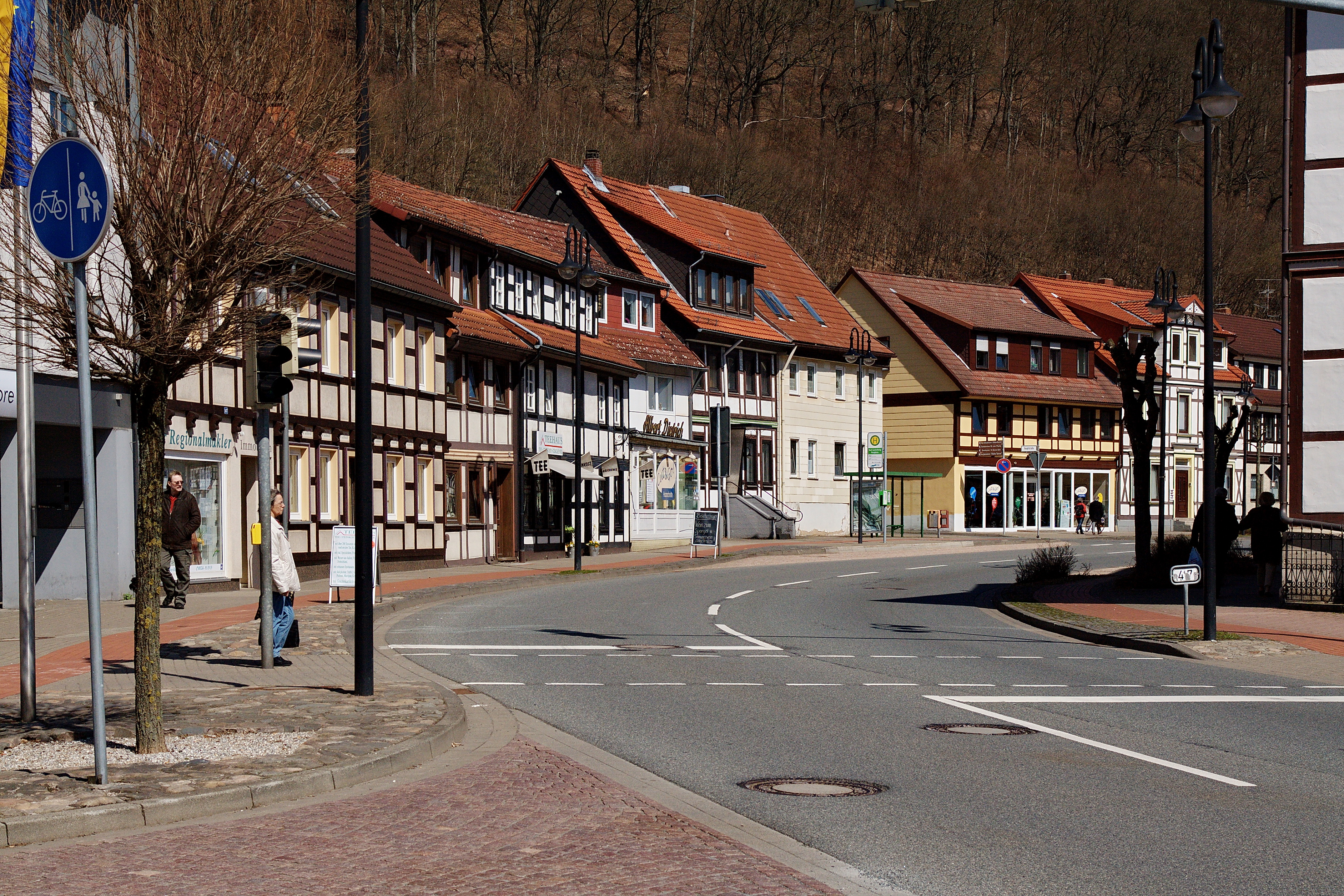 Bad Lauterberg (Harz) in Niedersachsen, Deutschland